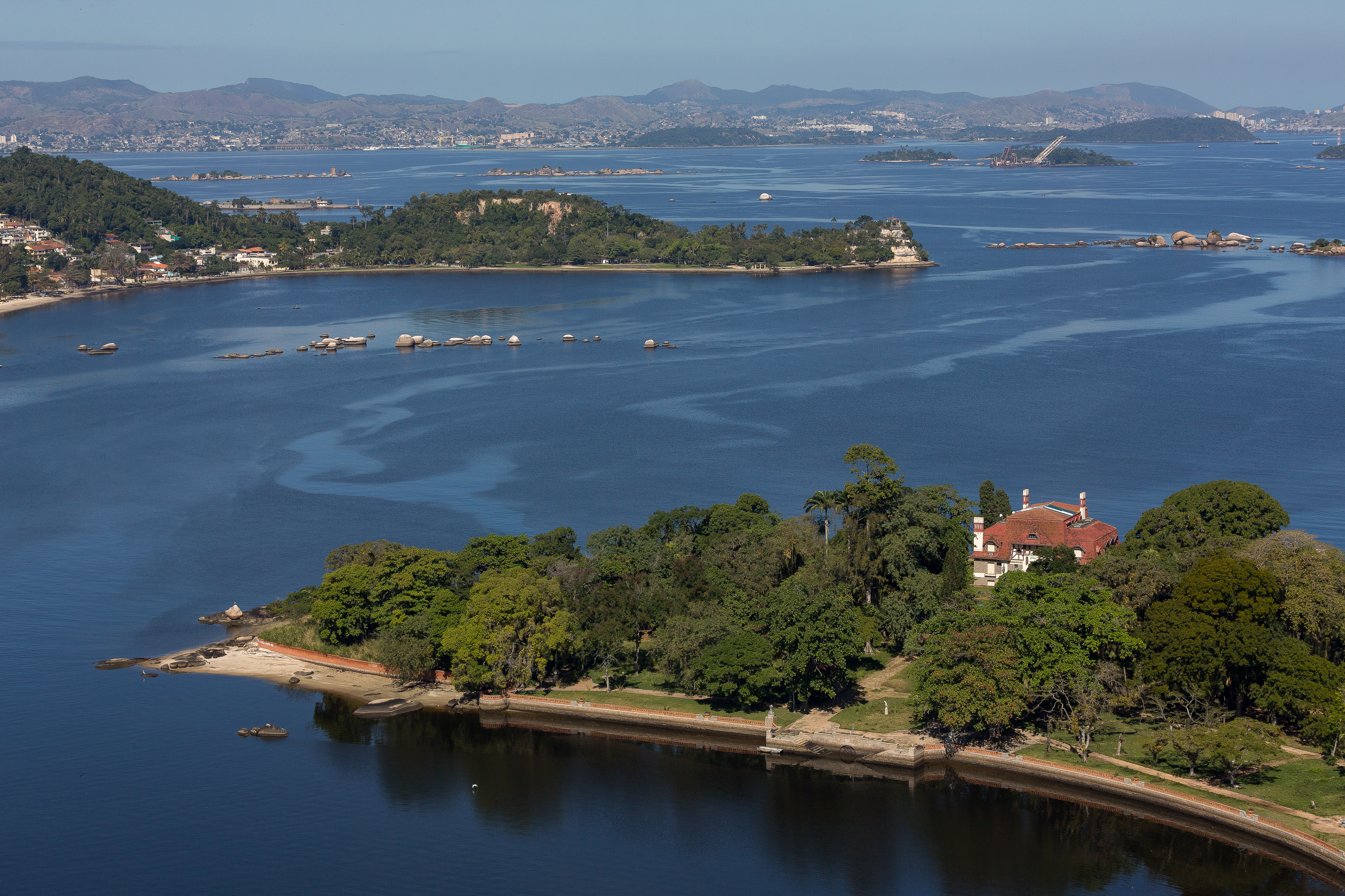 Vista aérea da Ilha do Brocoió, arquipélago da Ilha de Paquetá.